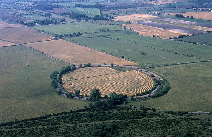 Motiv: Trindborgen Nyckelord: Flygbilder, Riksintressen Kategori: Fornborg .